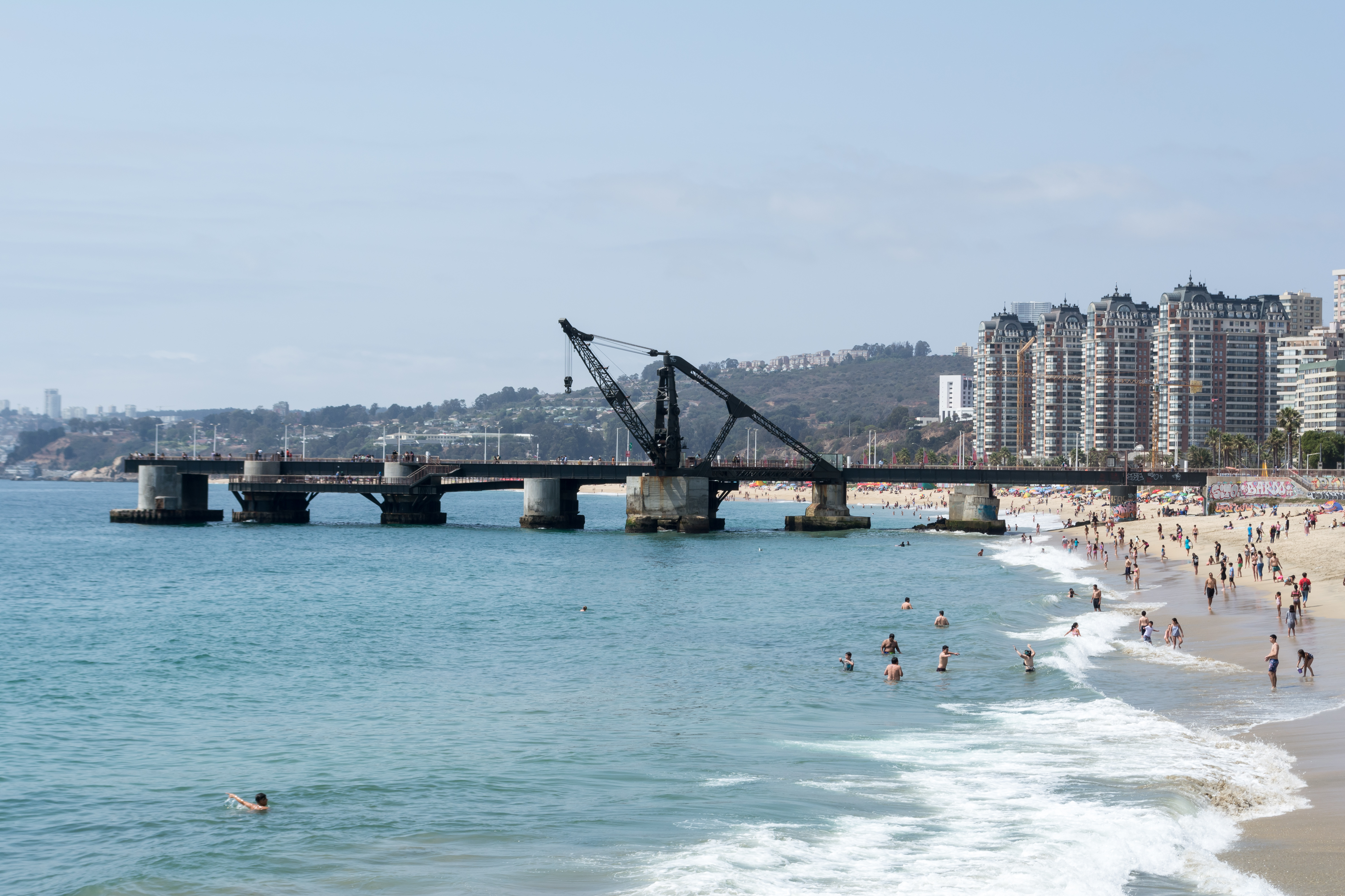 Muelle Vergara, Viña del Mar, Región de Valparaíso, Chile